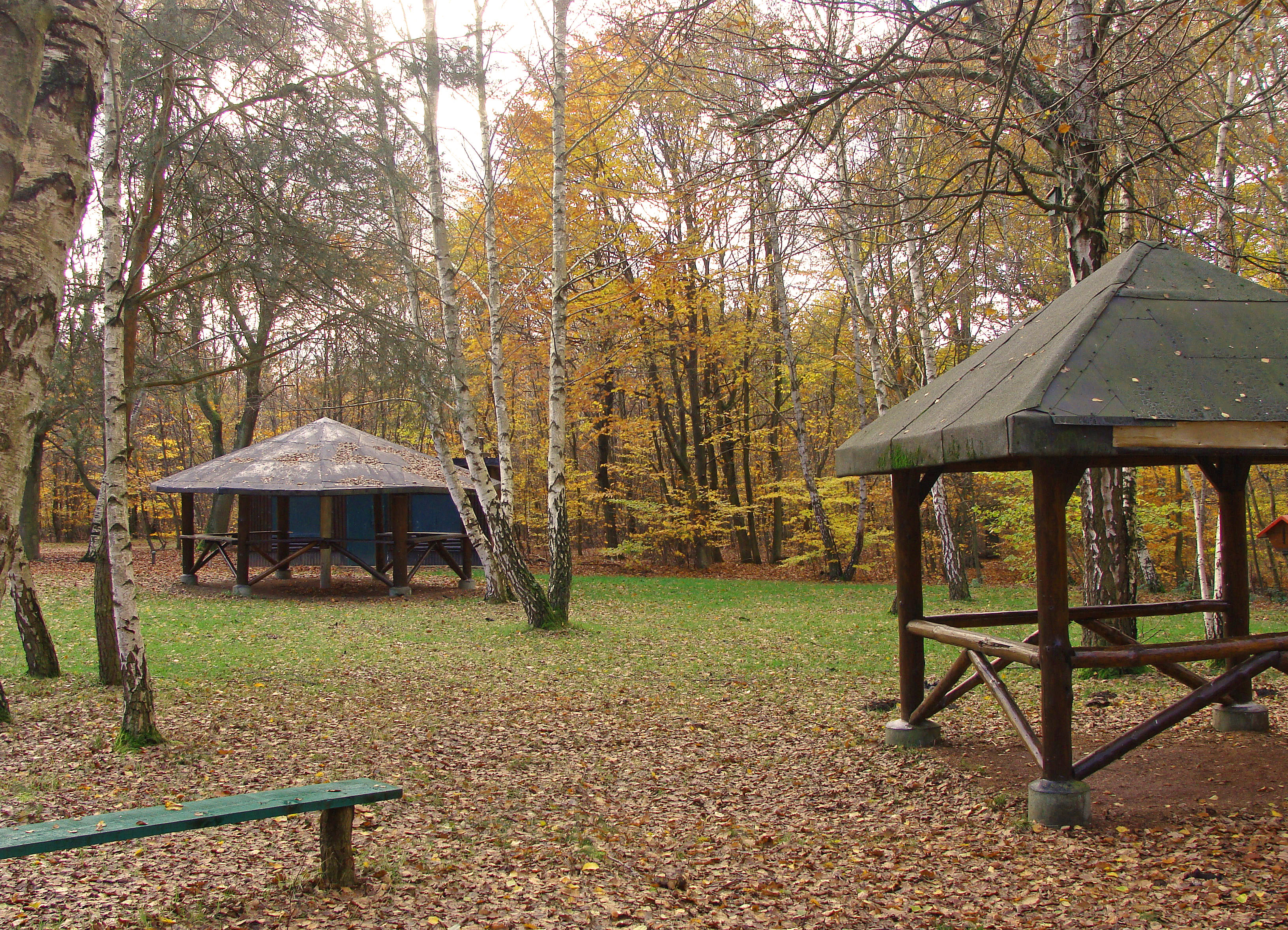 Chalet de l'association protectrice des oiseaux et de la nature (A.P.O.N.), forêt de Zang, L'Hôpital (Moselle) et Saint-Avold